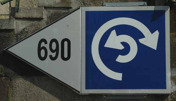 Verkehrszeichen für Schiffe am Donaukanal.